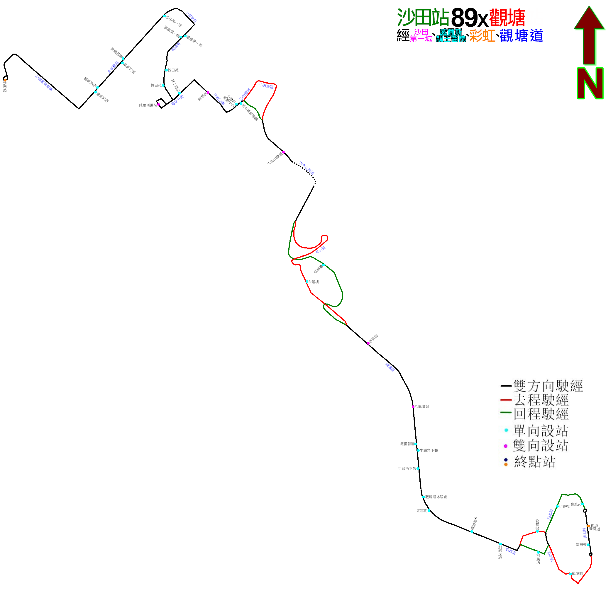 中文（香港）: 九巴89X線的走線圖